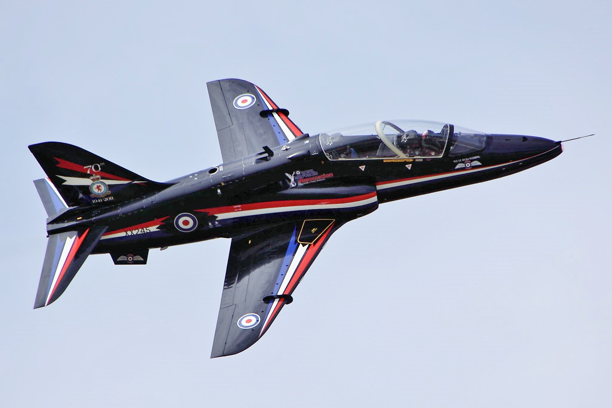 Hawk - RIAT 2011